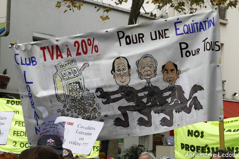 Photographie prise lors de la manifestation anti Equitaxe du 19/11/2013 à Paris